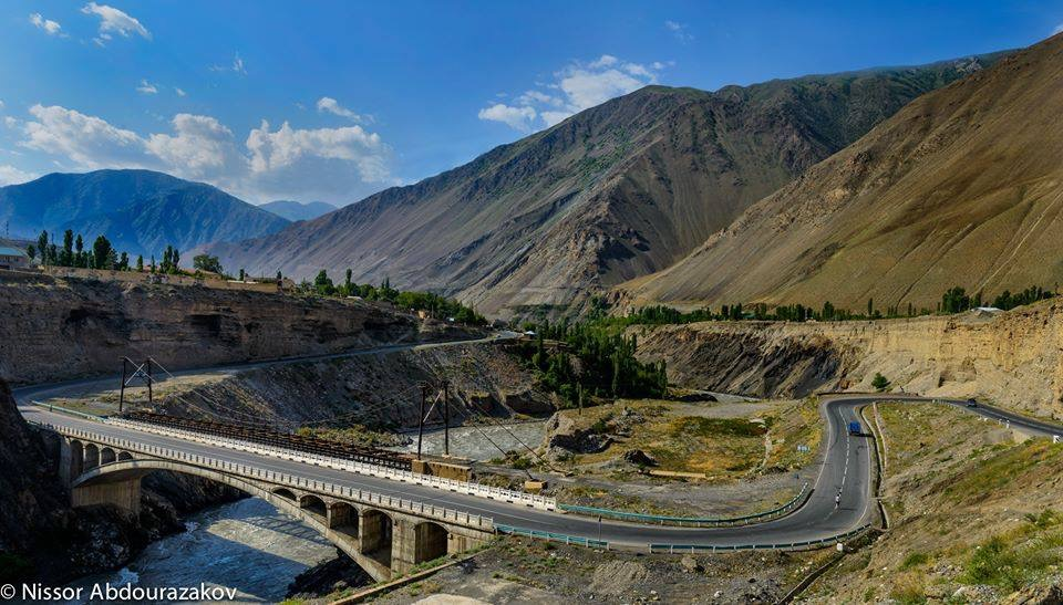 Тоҷикӣ: Пул дар дарёи Заравшон, назди шаҳраки Айнӣ, роҳи автомобилгарди Душанбе-Хуҷанд-Чанак